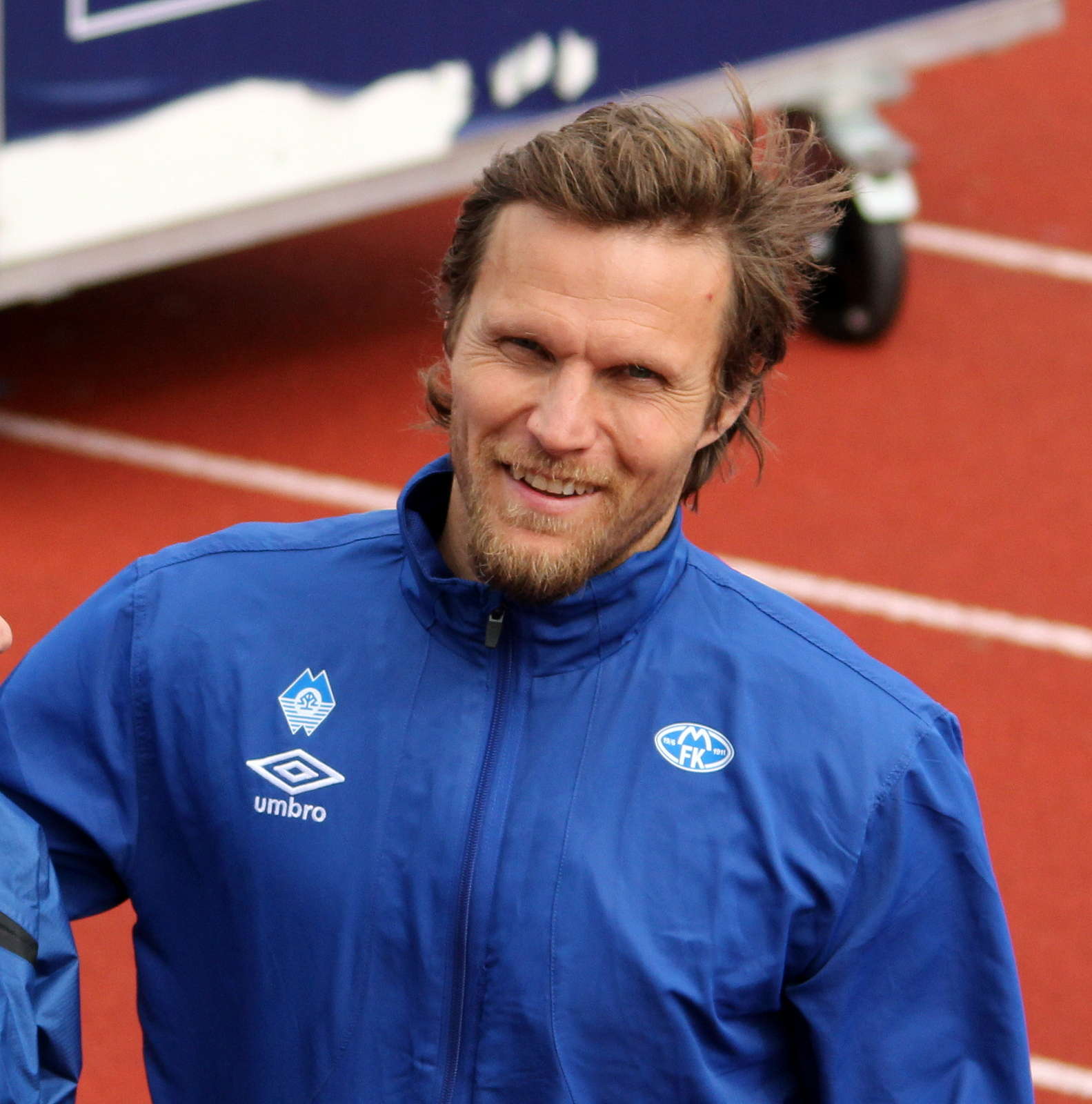 Daniel Berg Hestad på Sandnes Stadion i kampen mellom Sandnes ULF mot Molde